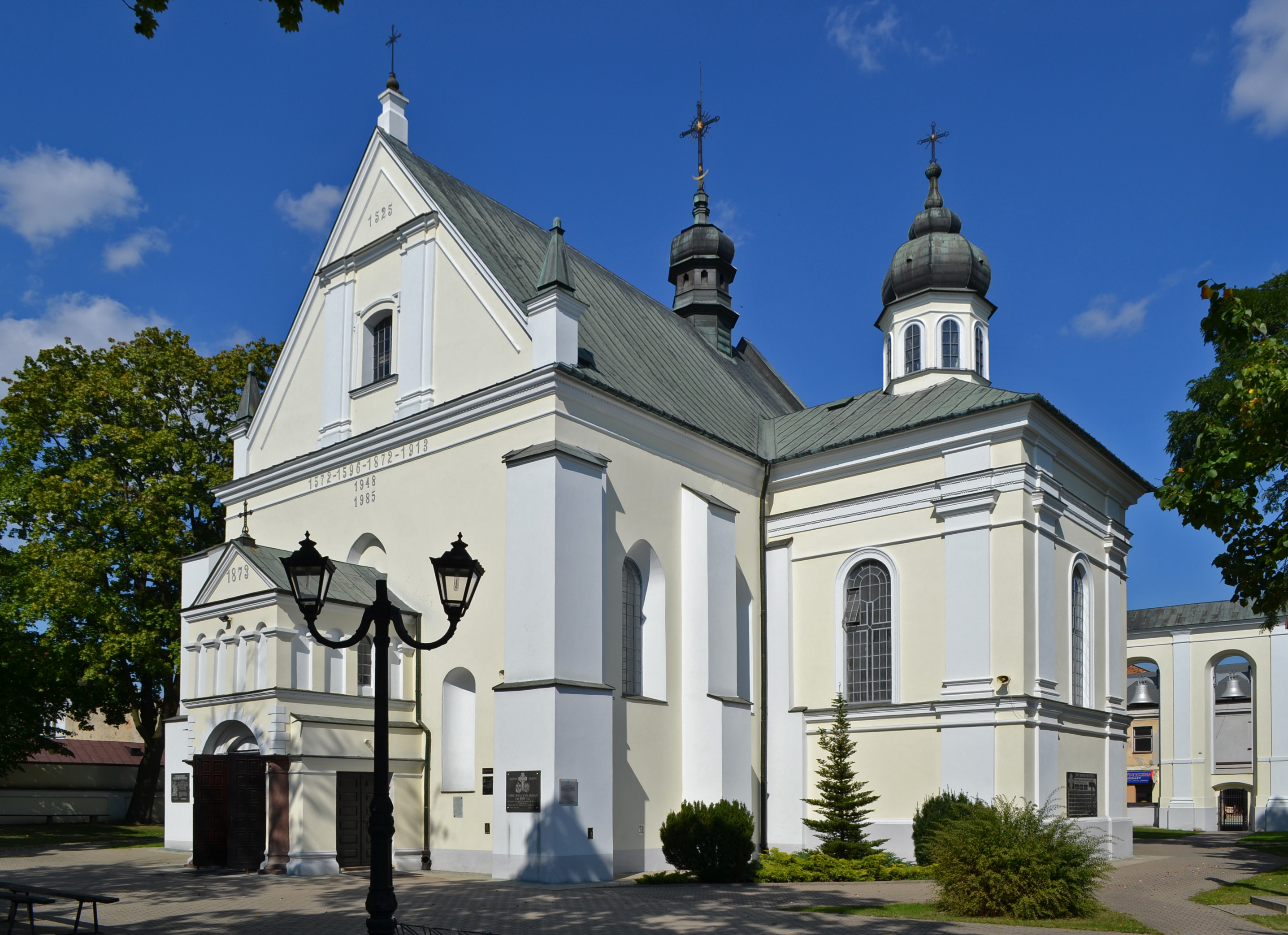 Biała Podlaska, kościół par. p.w. św. Anny, XVI, XVII, XVIII, XIX w.